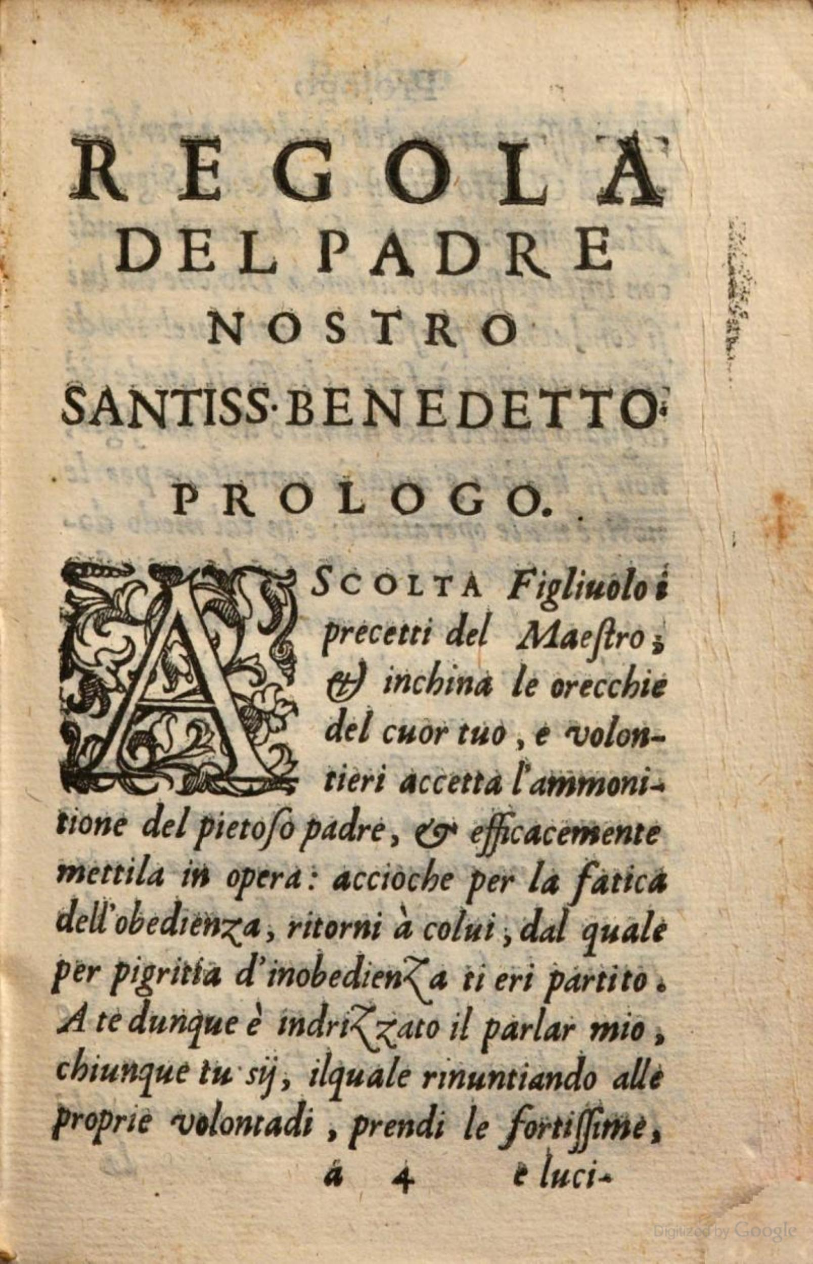 La regola di San Benedetto. Con le costituzioni delli eremiti di S. Romoaldo dell'ordine Camaldolese